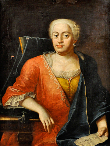 Bildnis der Anna Rebecca Senckenberg, geborene Riese, seit 1742 erste Ehefrau von Johann Christian Senckenberg